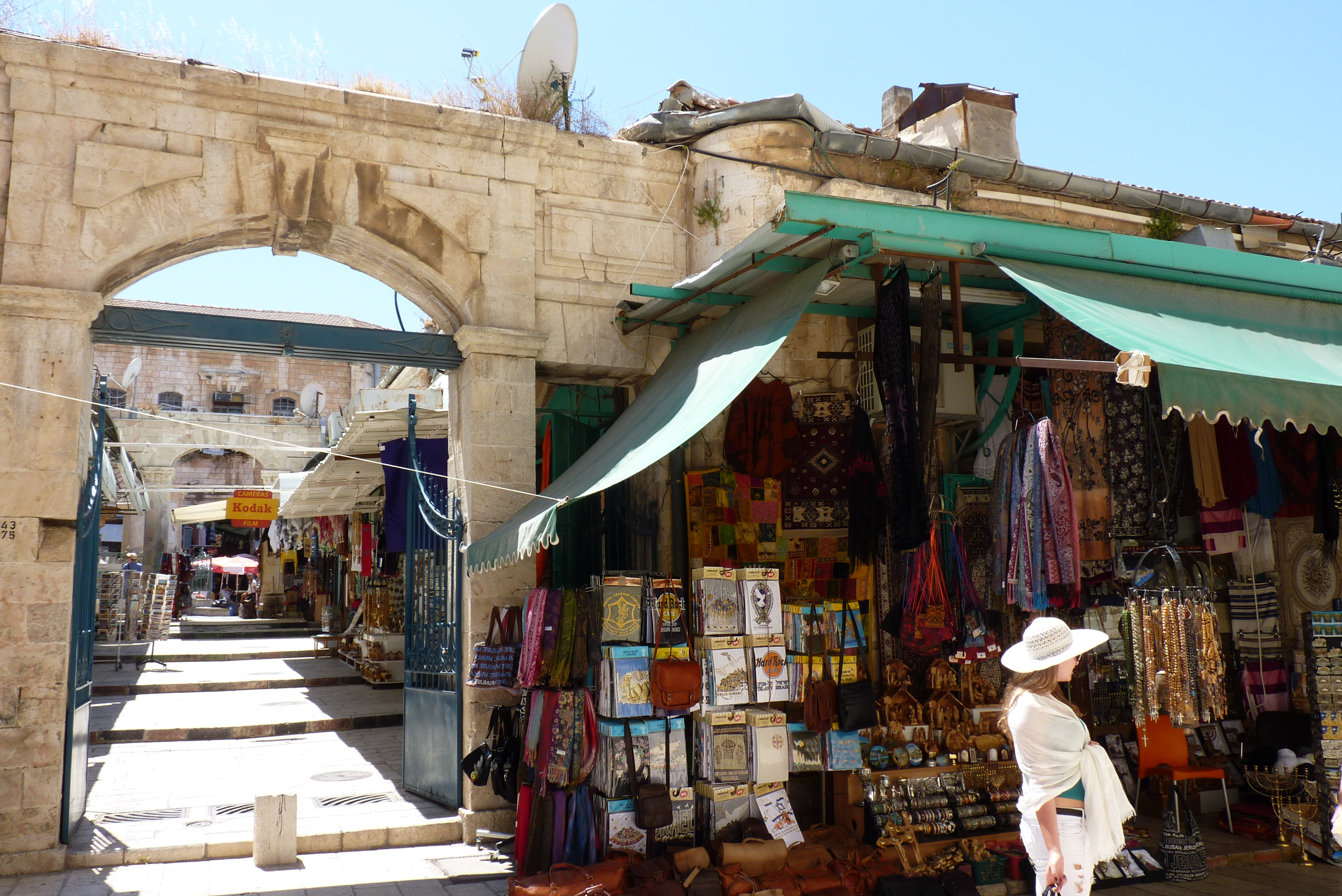 P1110332 Christian Quarter, Jerusalem